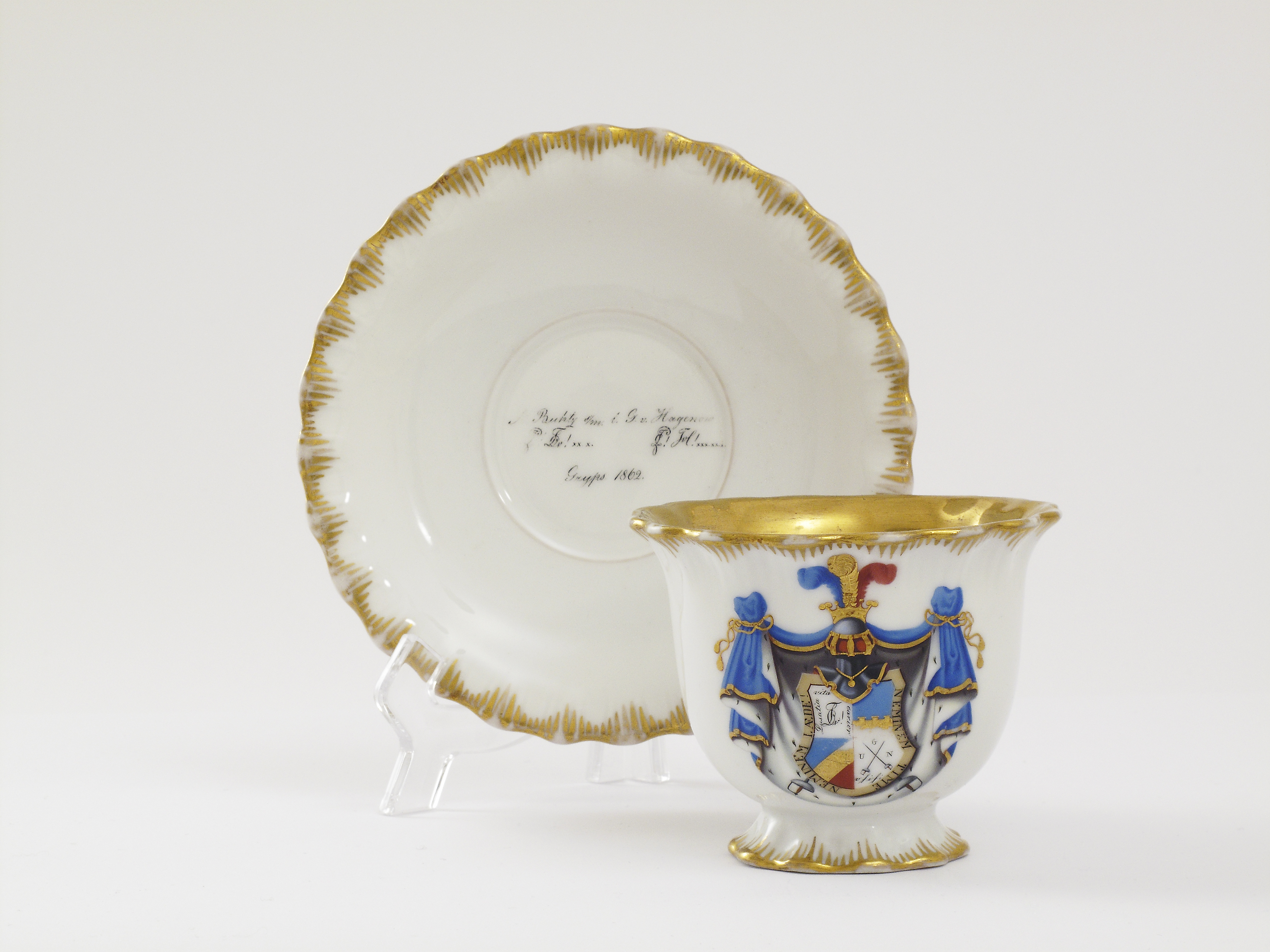 Tasse mit dem Wappen des Corps Lusatia Breslau (vor 1860); Untertasse mit Widmung von August Buhtz (Lusatia Breslau, Pomerania) an Gustav von Hagenow (Pomerania, Hansea Bonn)